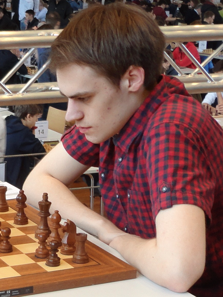 Matthias Blübaum, Grenke Chess Open 2016 in Karlsruhe.